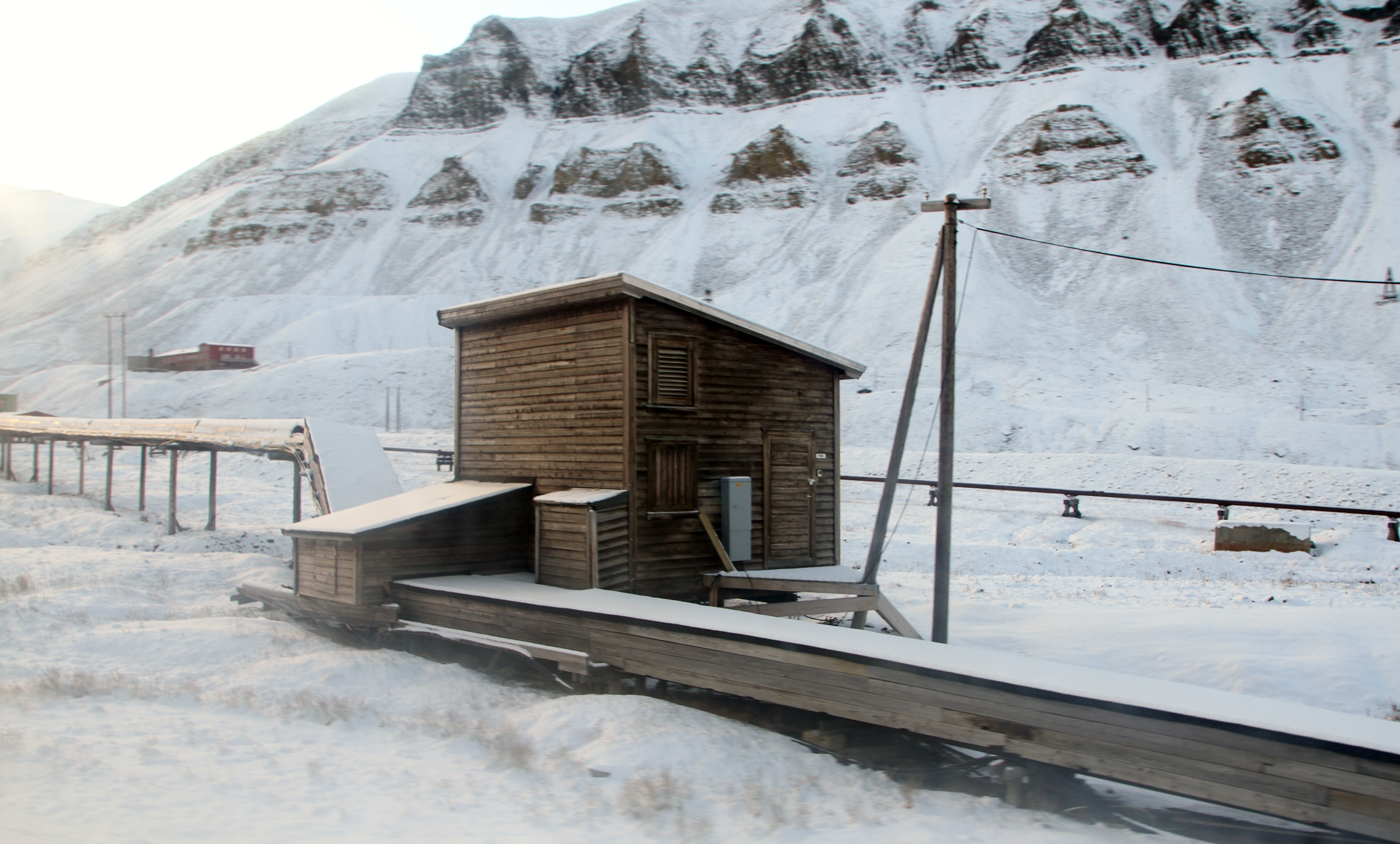 Water supply facility in Nybyen, Longyeardalen, by Longyearbyen (Spitsbergen), Norway